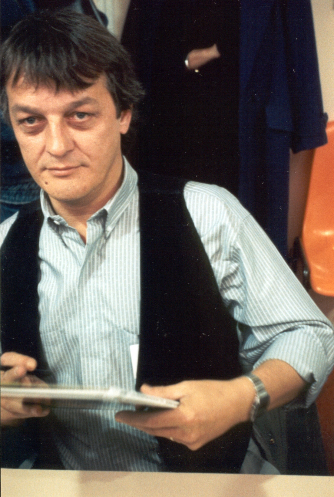 Pierre Seron, auteur de bande dessinée